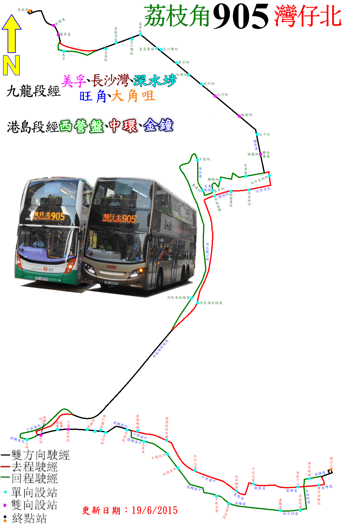 中文（香港）: 過海隧巴905線的走線圖